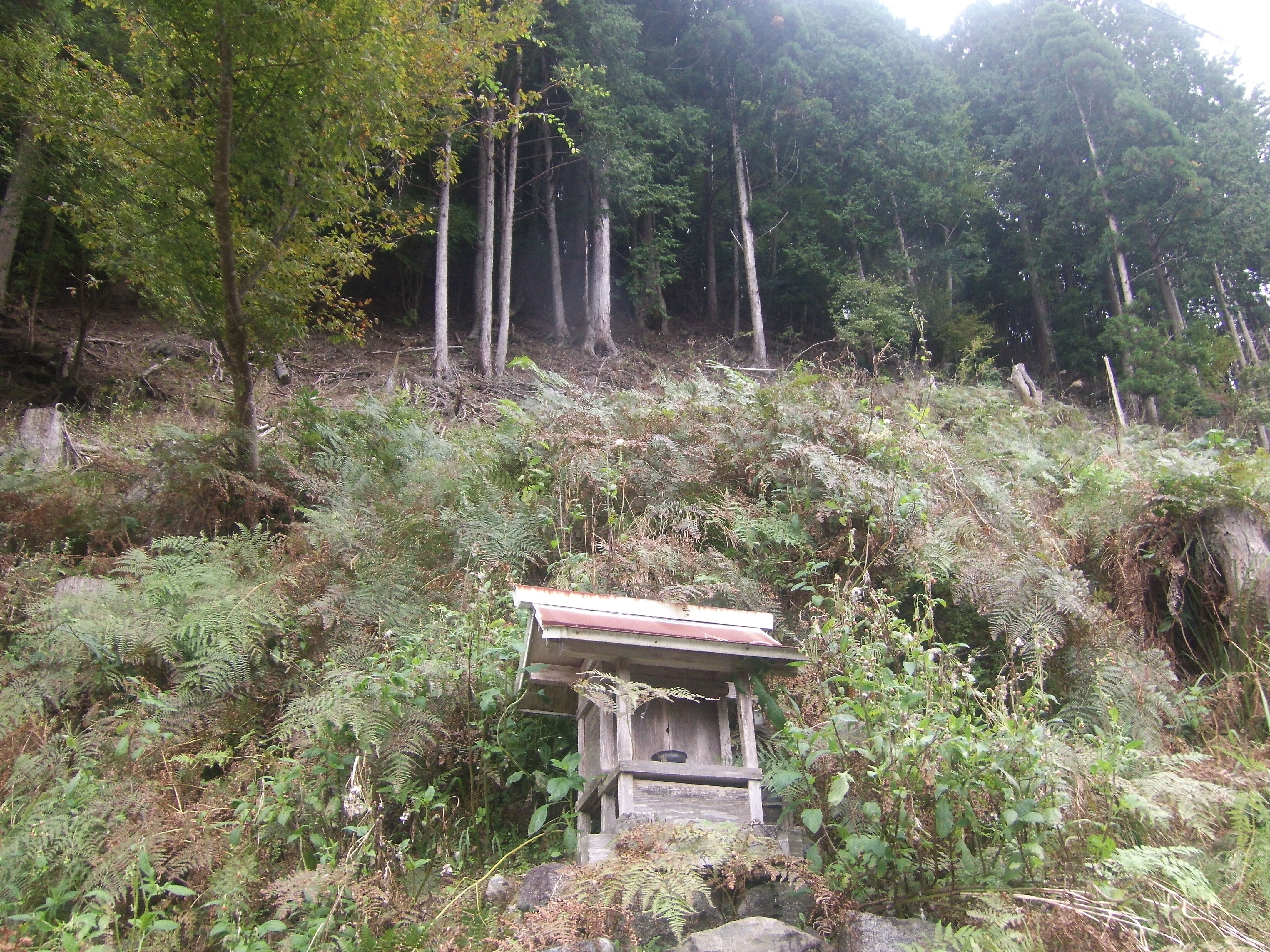 北山杉林業での安全祈願や成長祈願(害虫や災害避け)を行う祠 山の神を祀っており、左京区北白川や南丹市園部の大山祇神社の御札などが奉納されている 画像は左京区花脊から広河原にかけての山中